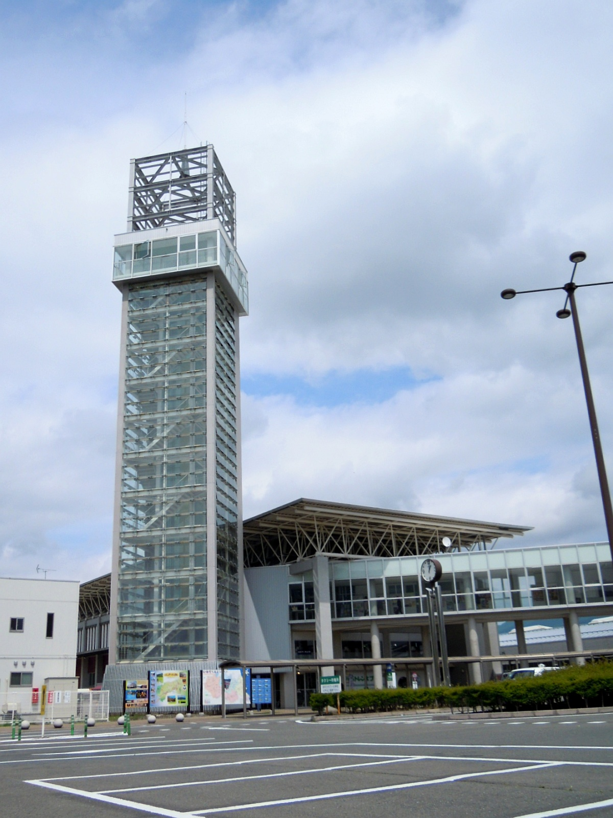 岩手県二戸市にある二戸広域観光物産センター「カシオペアメッセ・なにゃーと」の展望塔